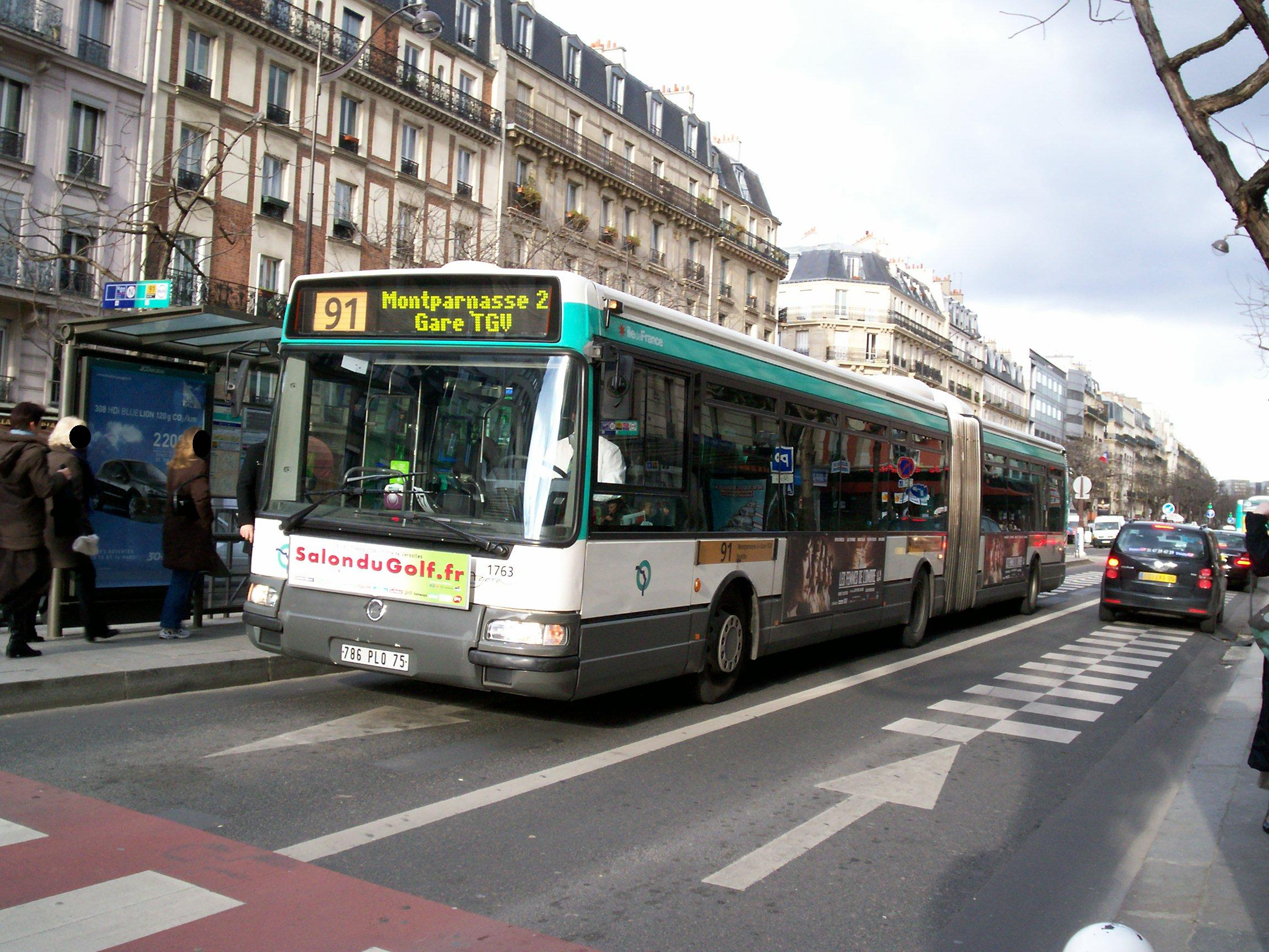 Bus en arrêt